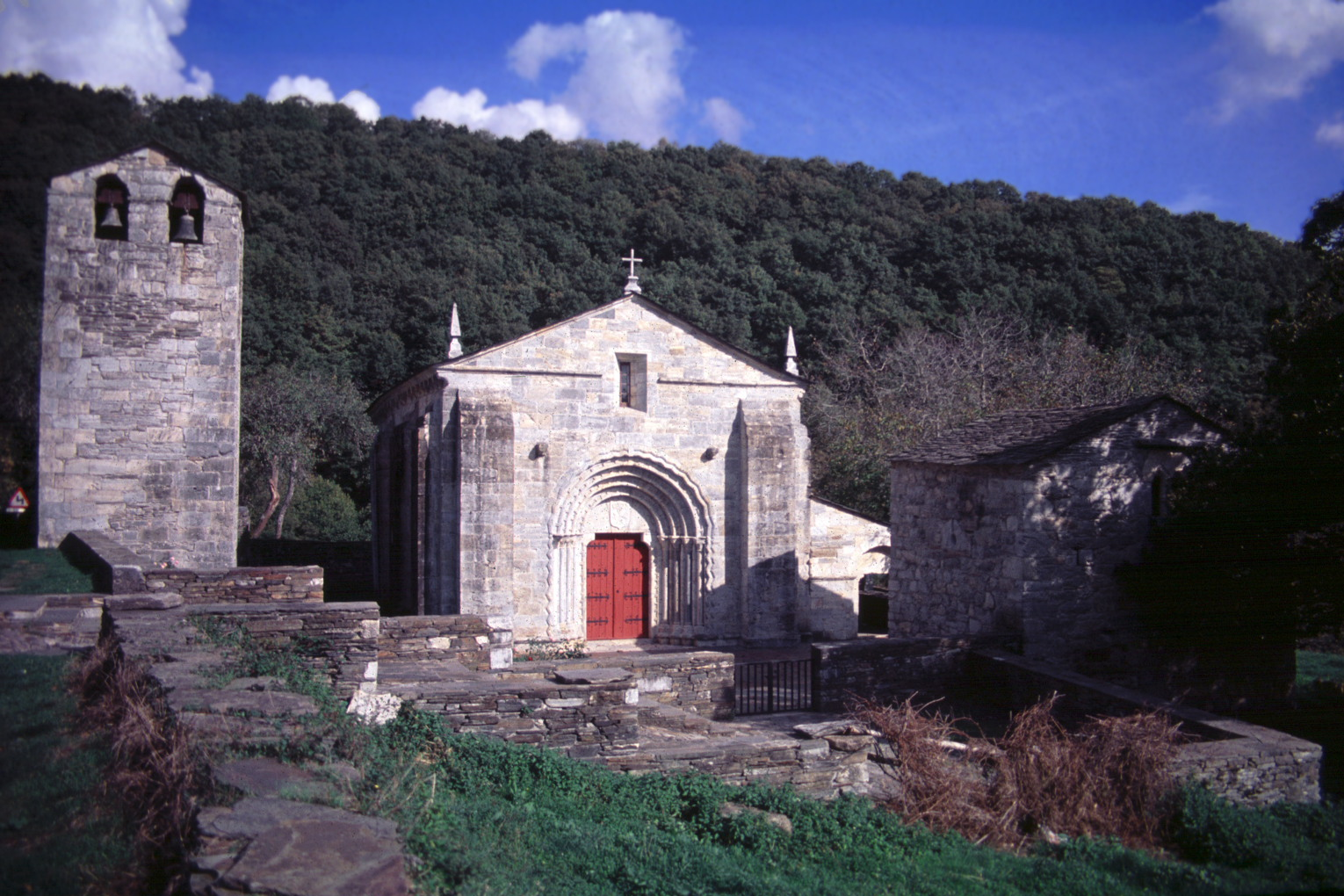 Iglesia de San Pedro Felix, Hospital de Incio (Lugo) Esta é unha foto dun monumento declarado no rexistro de Bens de Interese Cultural do patrimonio español co código RI-51-0004505.